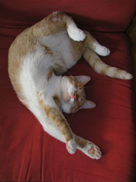 Отдыхать хорошо))).